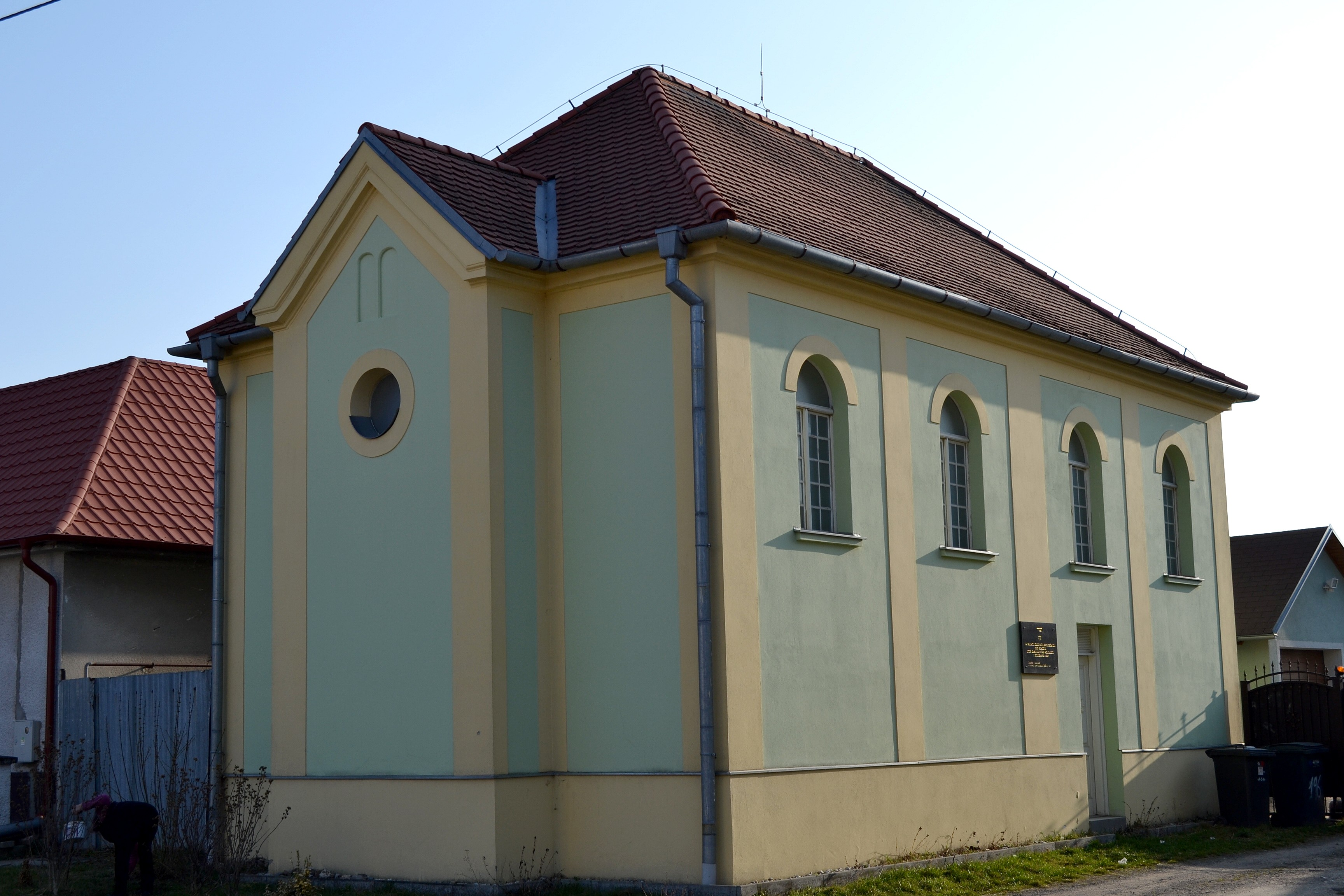 Rohožník. Synagóga z 19. storočia